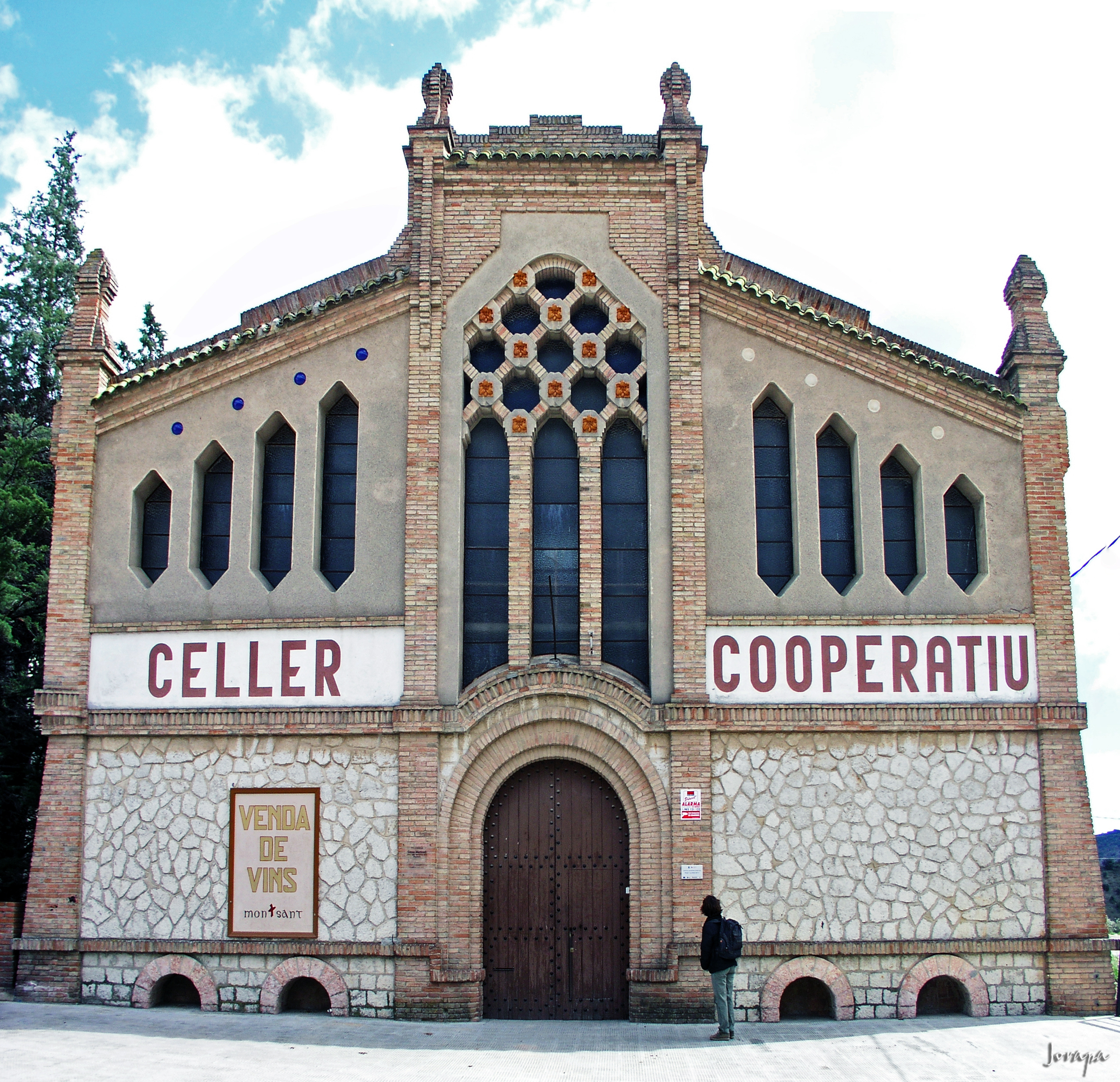 Celler Cooperatiu (Cornudella de Montsant)